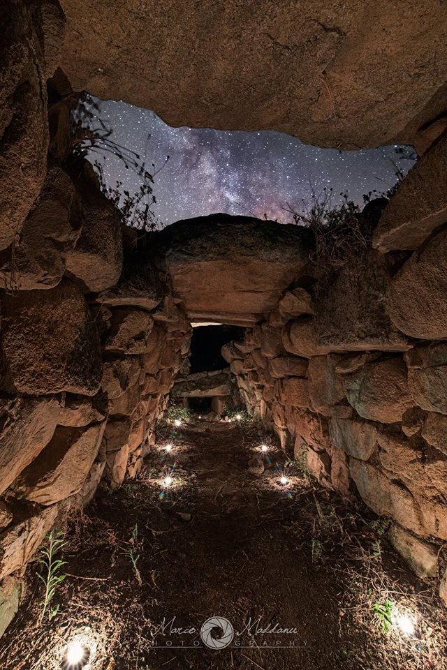 entrance of the tomb of San Cosimo